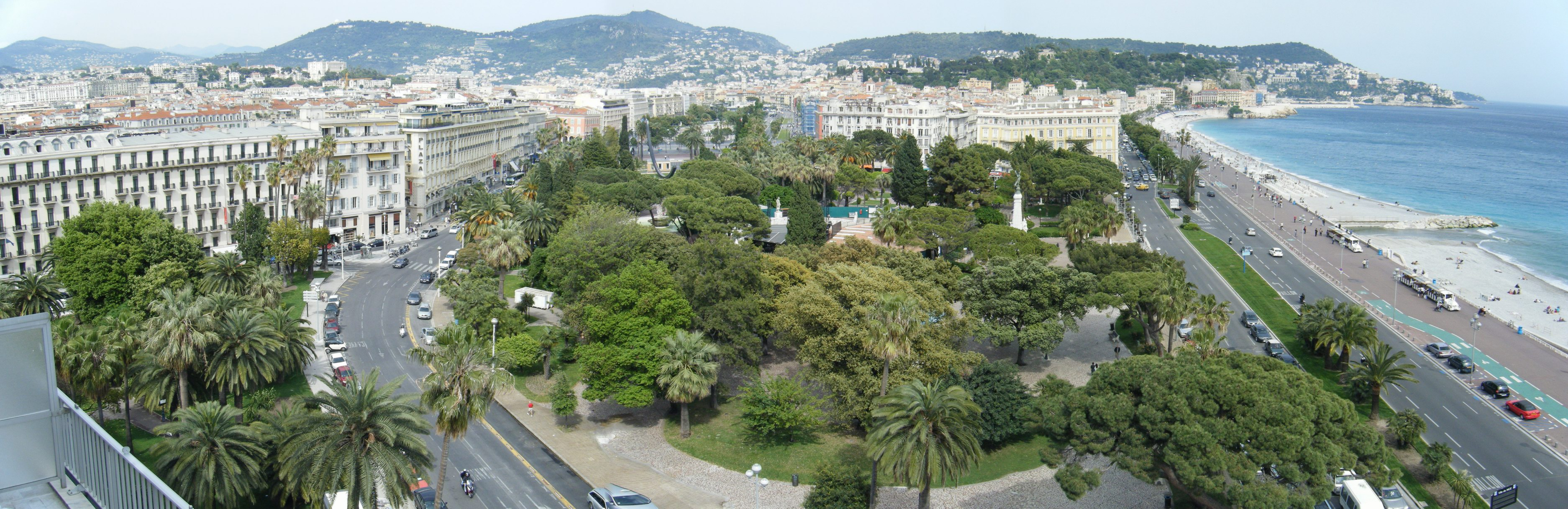 Jardin Albert 1er de Nice